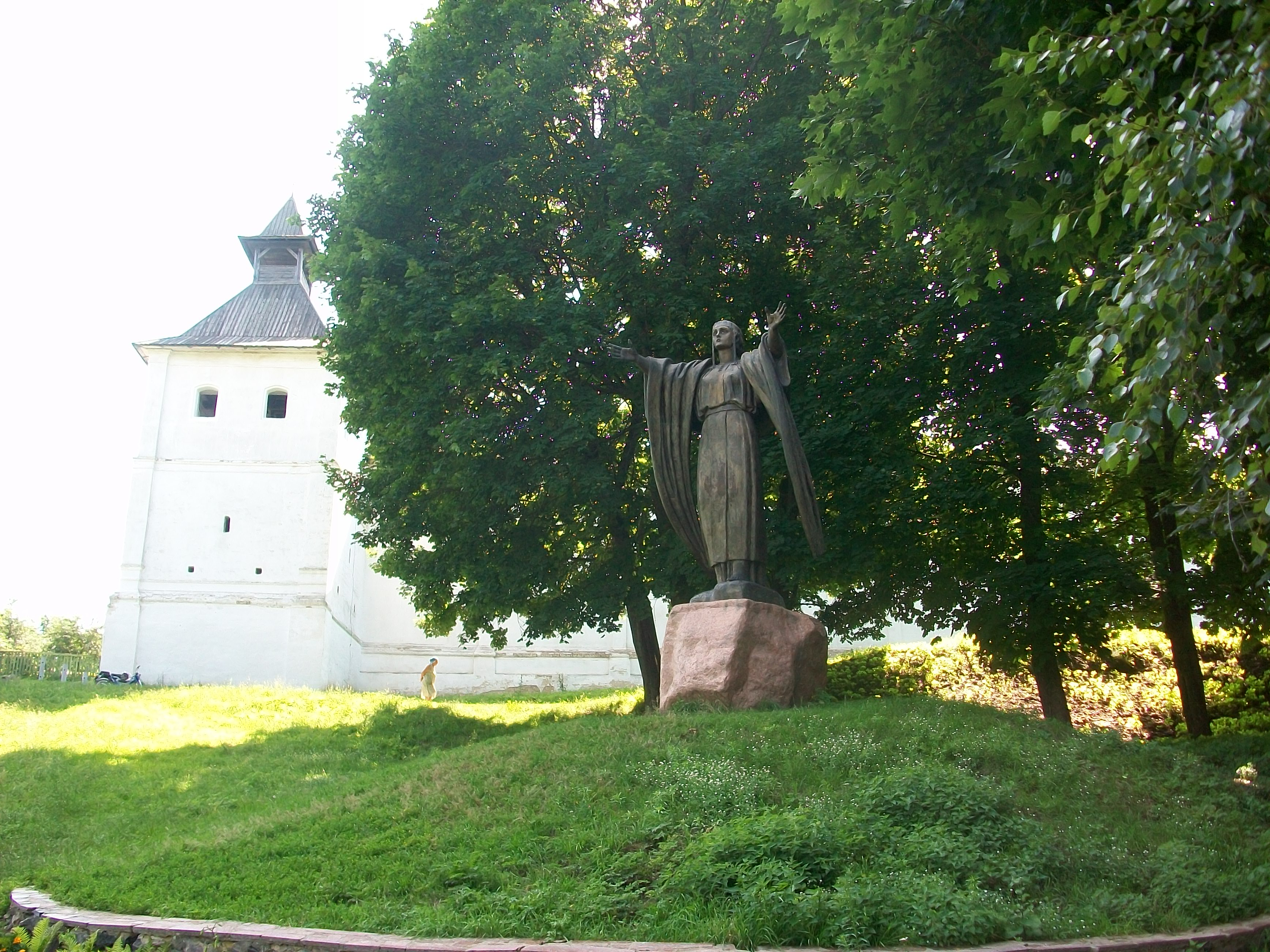 Цитадель и Ярославна в Новгород-Северском